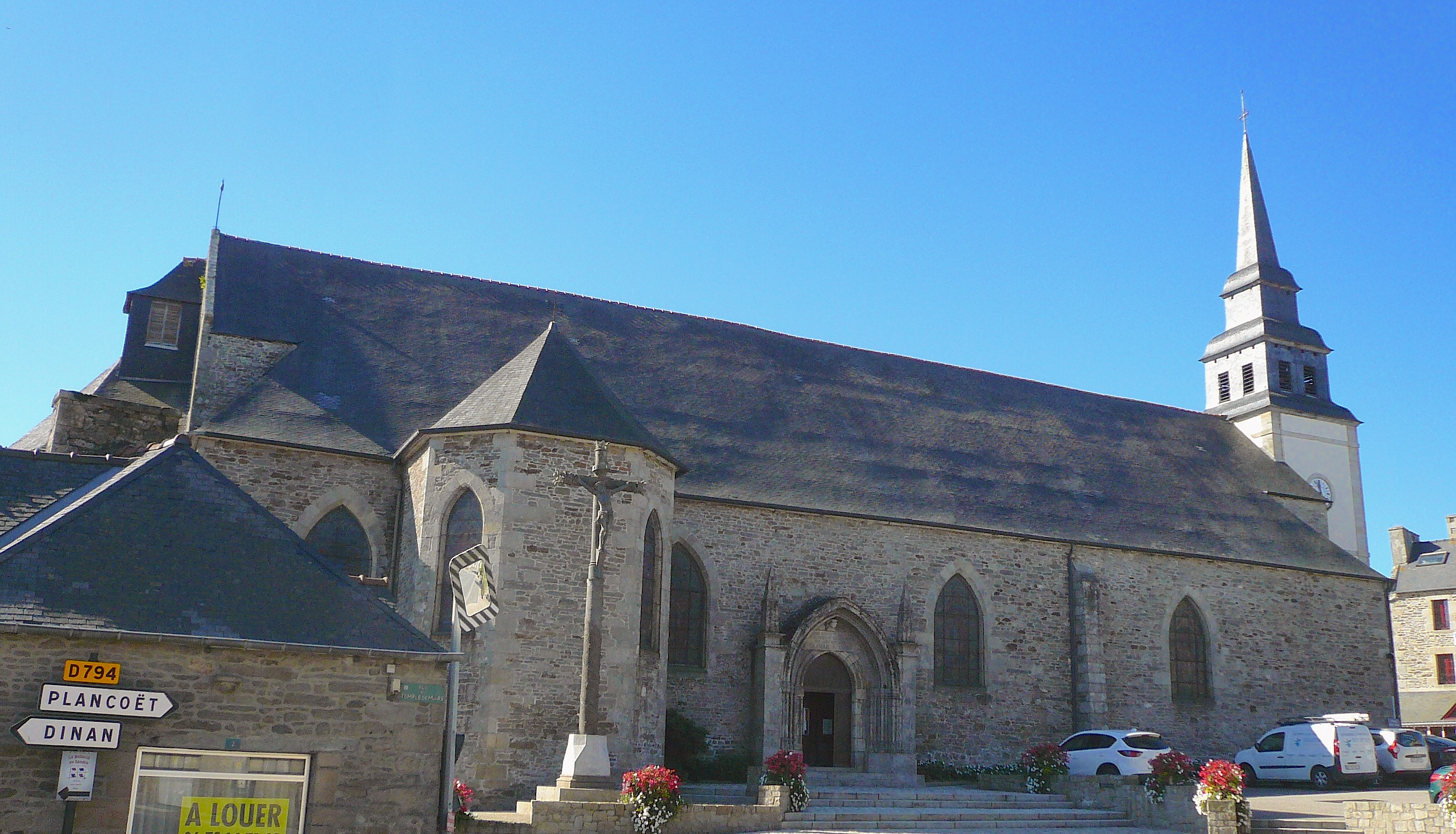 L'église Saint-Pierre de Corseul dans les Côtes d'Armor.